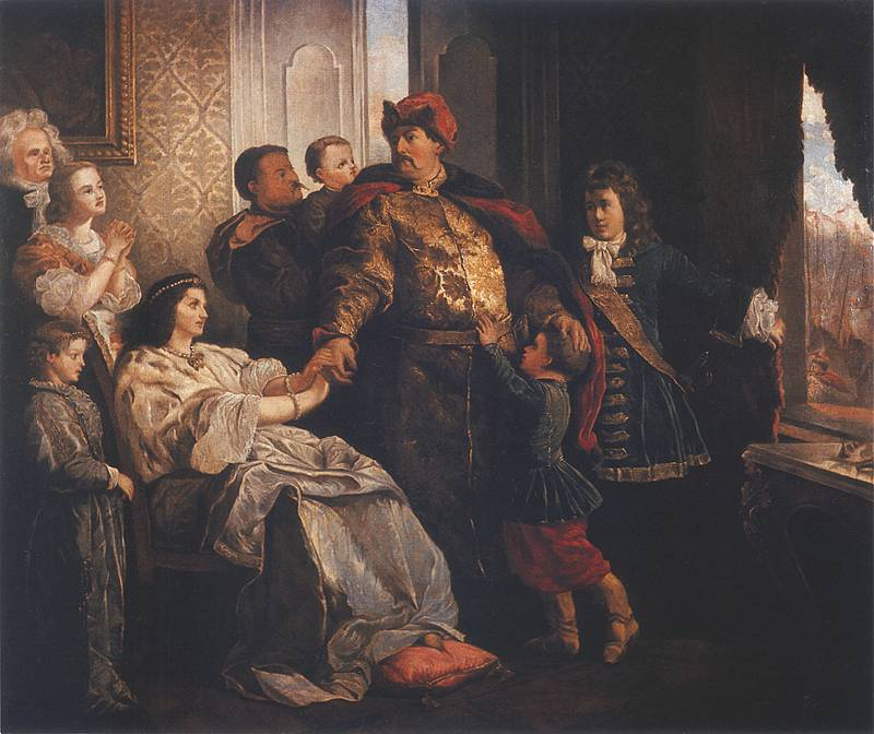 Pożegnanie Jana III z rodziną przed wyprawą wiedeńską, oil on canvas, 169 x 201 cm, Masovian Museum, Płock